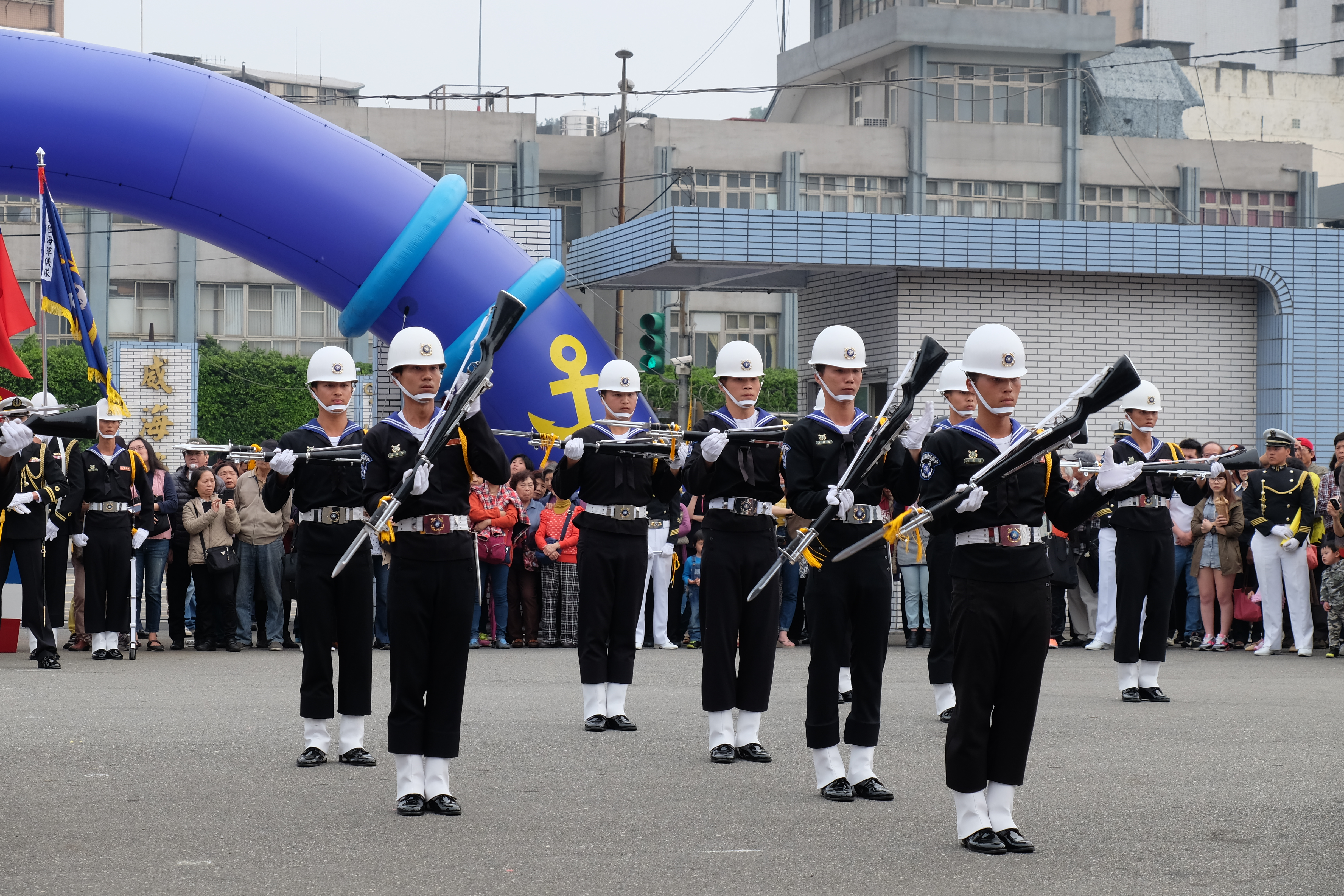 2015年3月16日下午，海軍104敦睦遠航訓練支隊基隆訪問活動，表演操槍術的海軍儀隊。